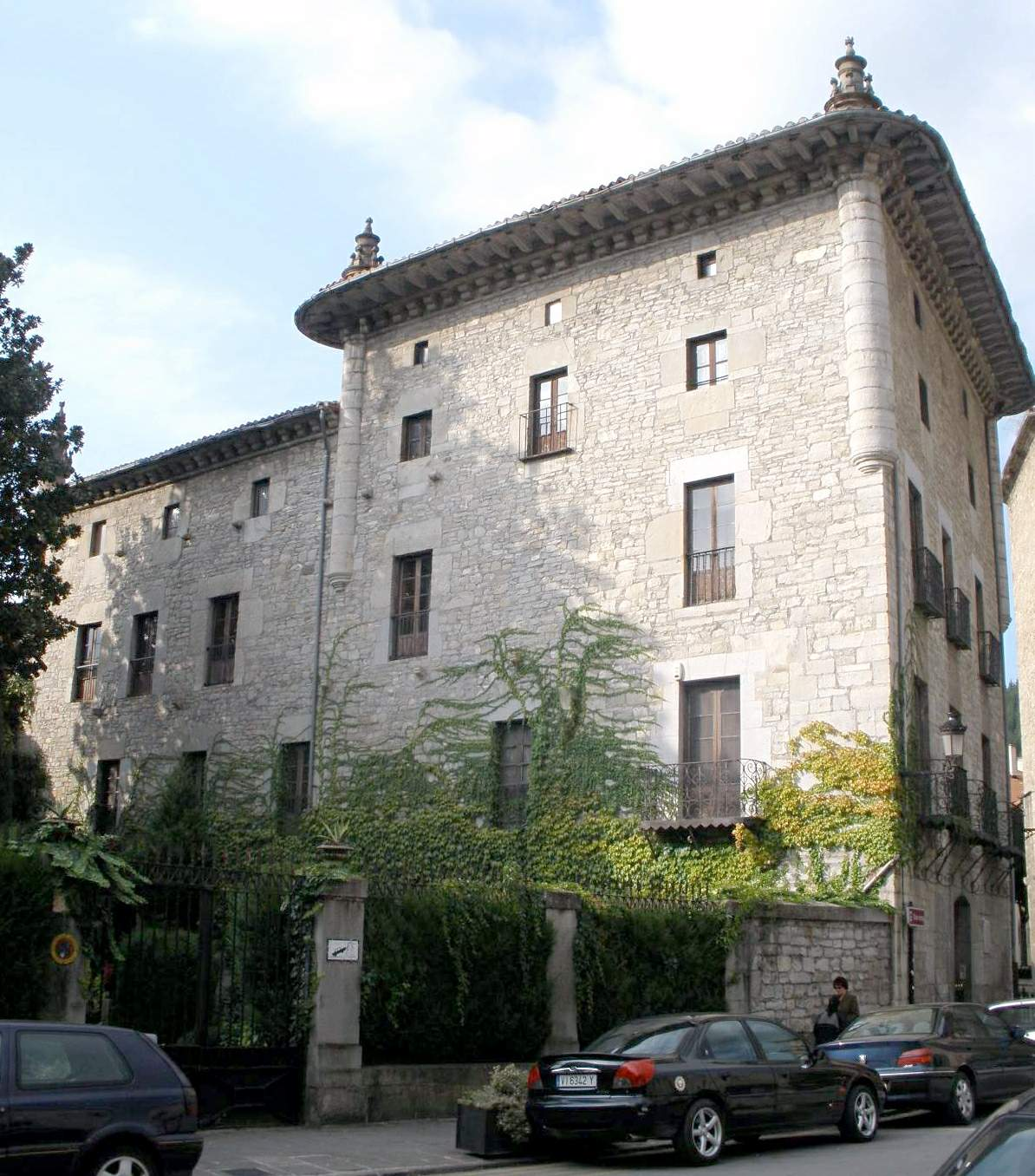 Torre Olaso (Bergara)